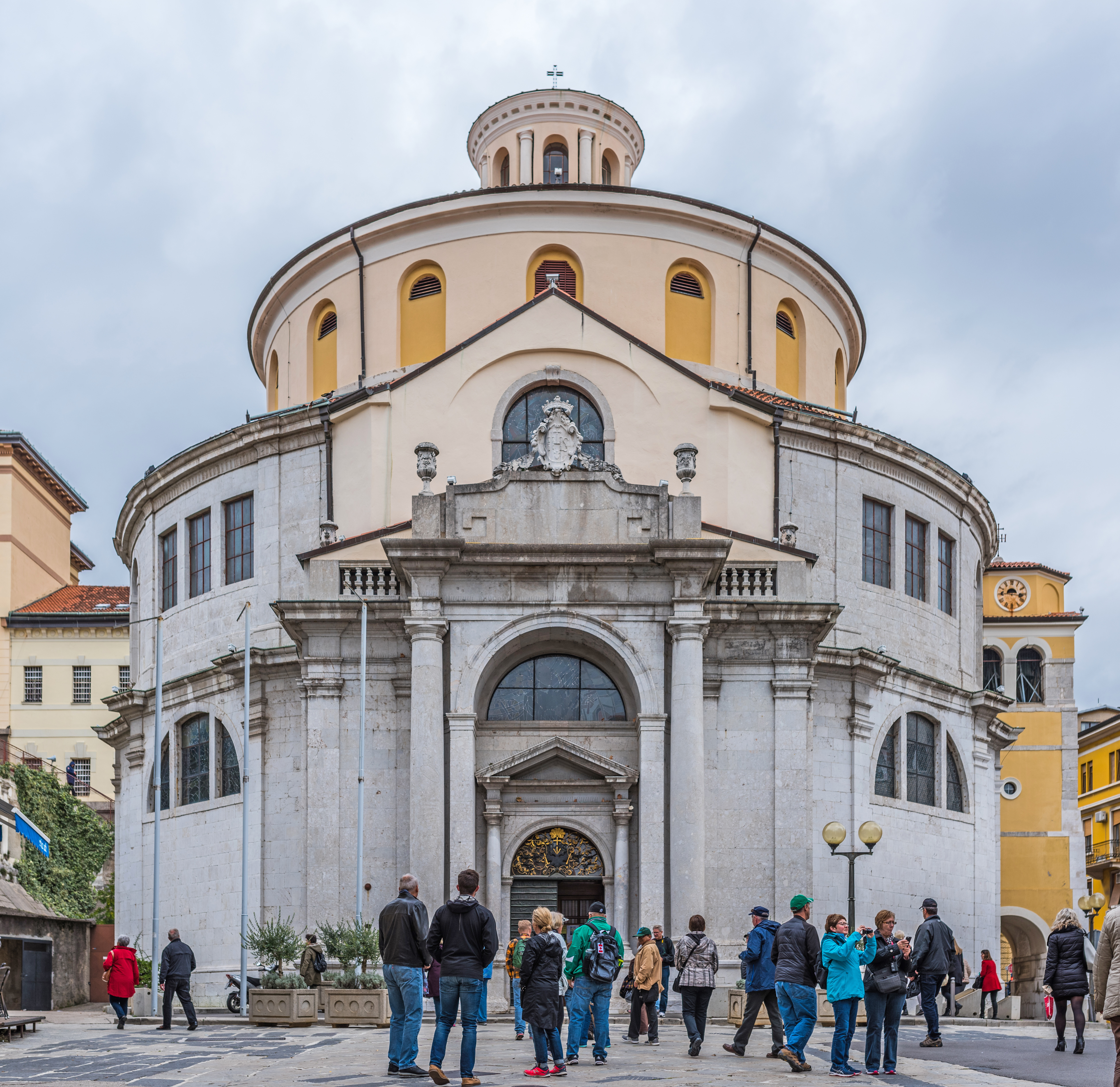 Rijeka Croatia November 2017